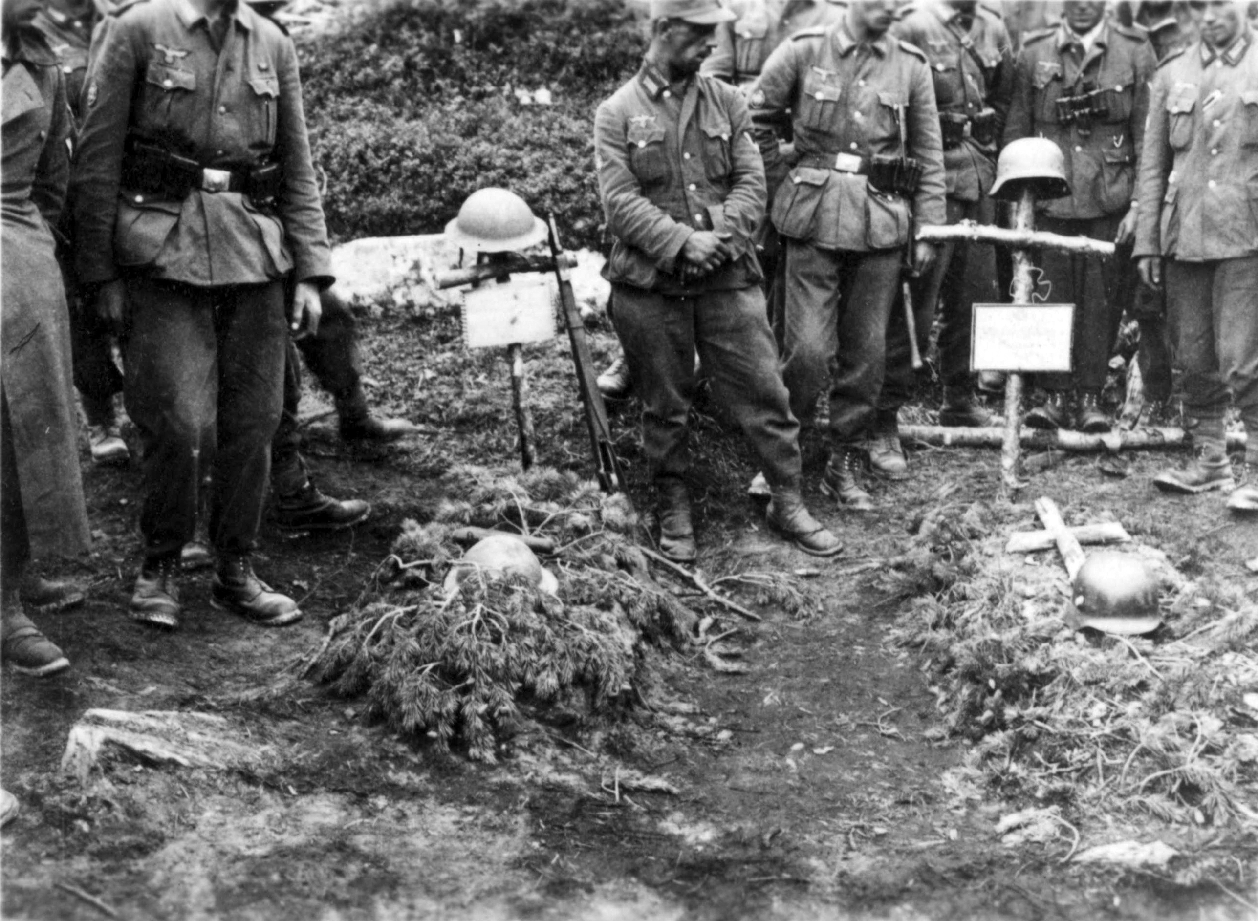 Tyske soldater ved gravene til engelske og tyske soldater. Bildet er tatt ved Viskiskoia bru, Saltdal Tittel / Title: Tyske soldater ved graver av engelske og tyske soldater. Dato / Date: Ukjent/Unknown Fotograf / Photographer: Karl Marth Sted / Place: Saltdal, Nordland, Norge Eier / Owner Institution: Arkiv i Nordland Lenke / Link: Arkiv i Nordland Arkivreferanse /Archive reference: AIN.NA143.0017 Fra Dag Skogheims Privatarkiv